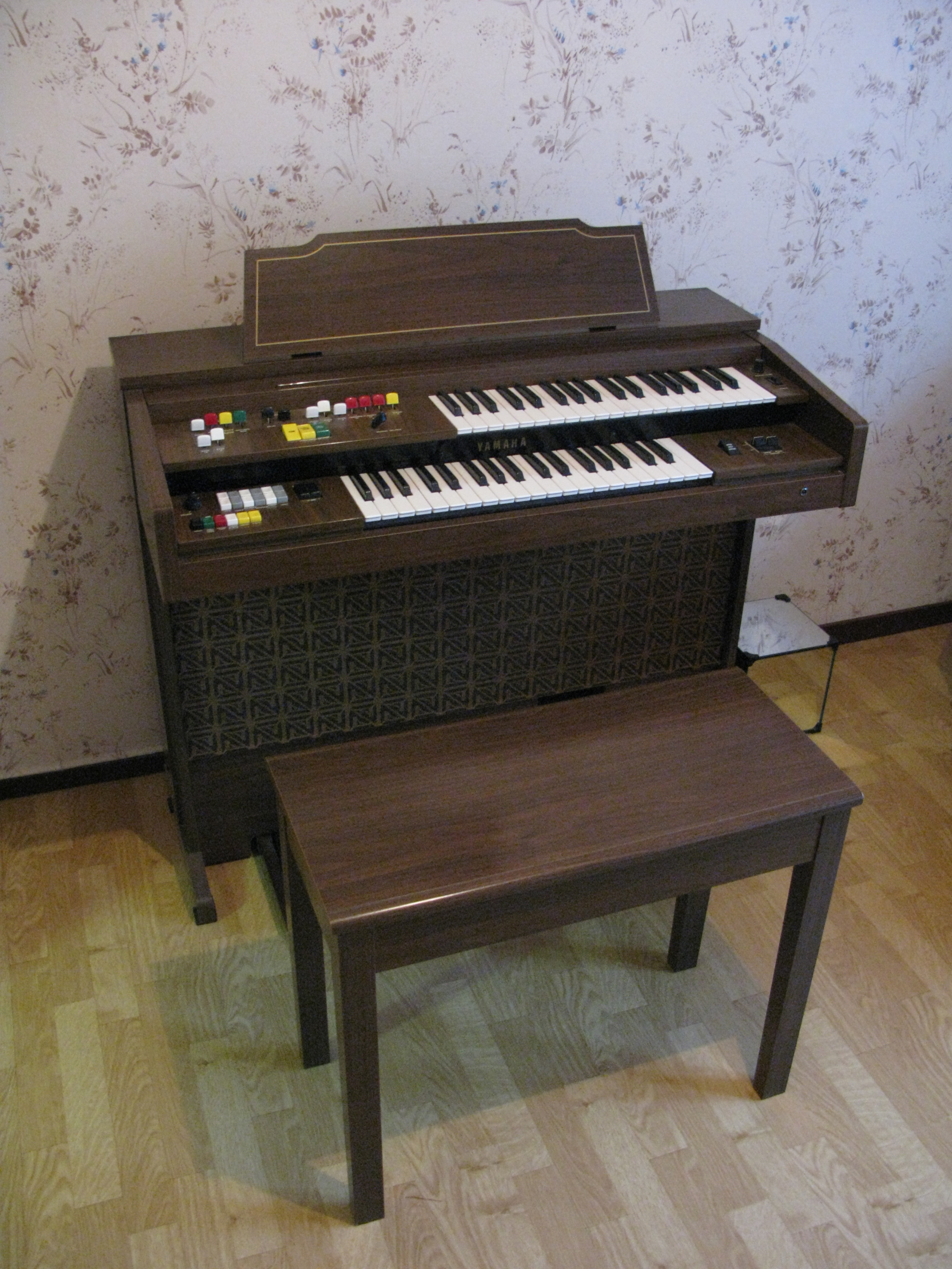 Yamaha Electone A-55